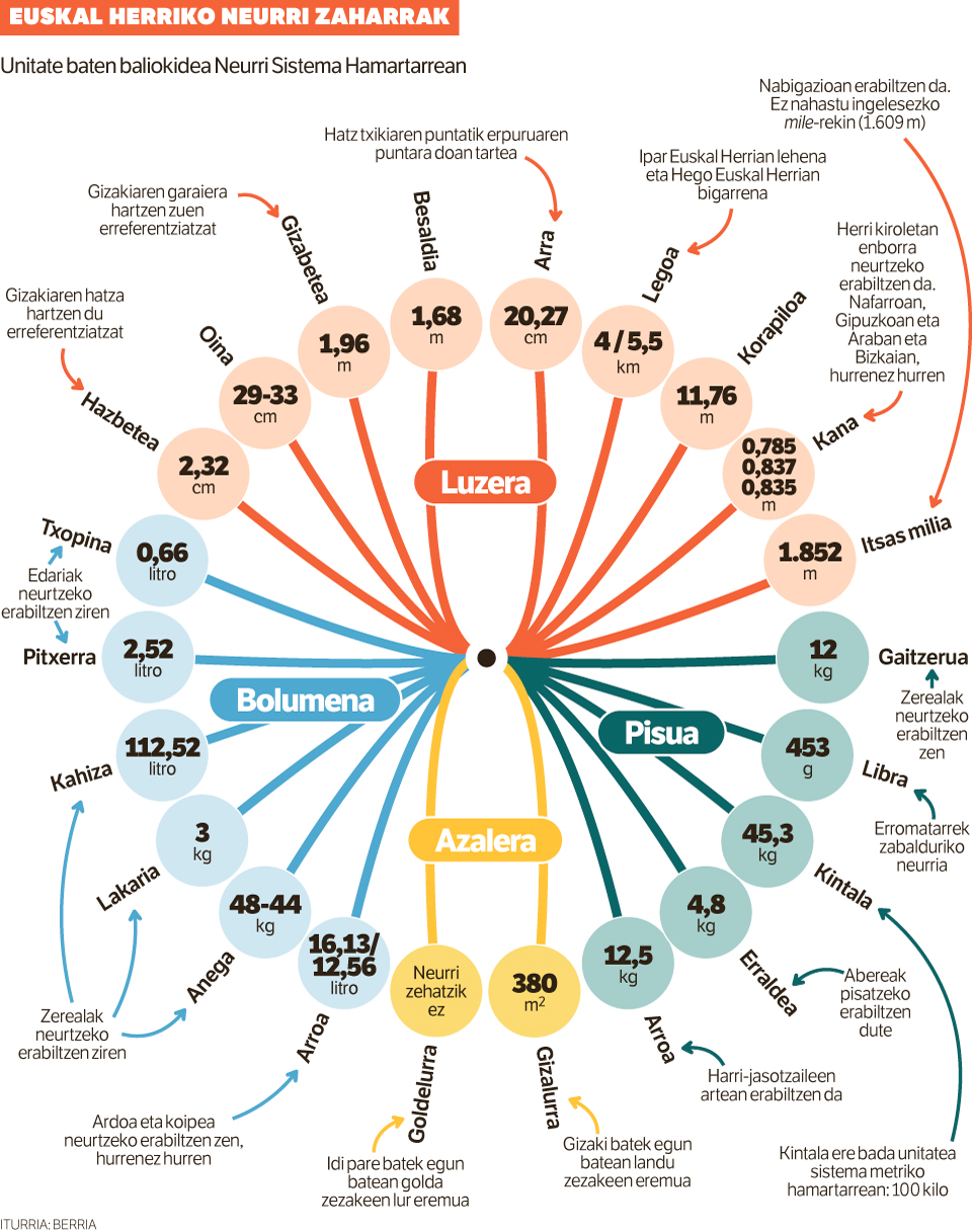 Euskal Herrian erabiltzen ziren neurri zaharrak